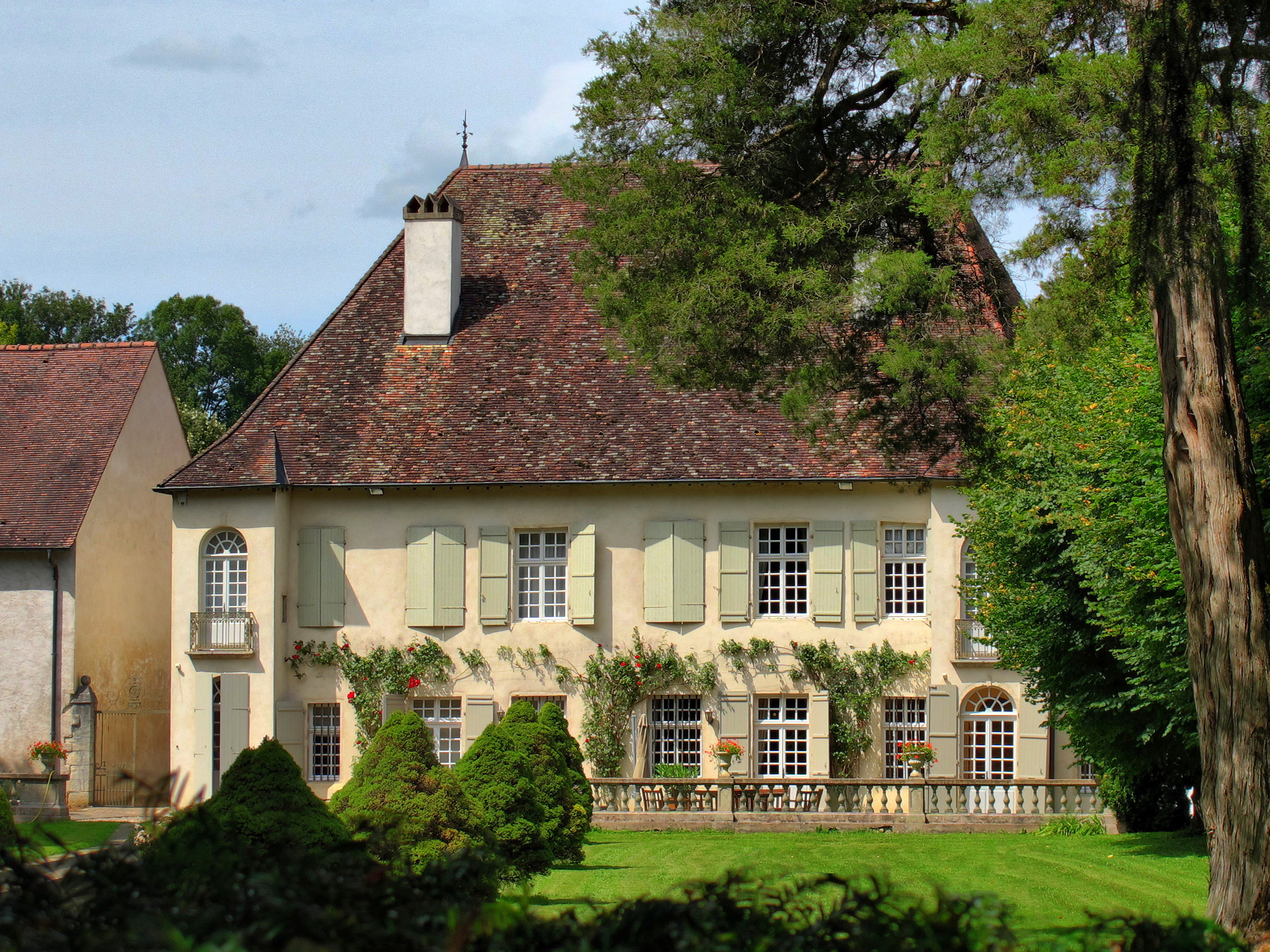 Inscrit aux monuments historiques sous le numéro PA00102173